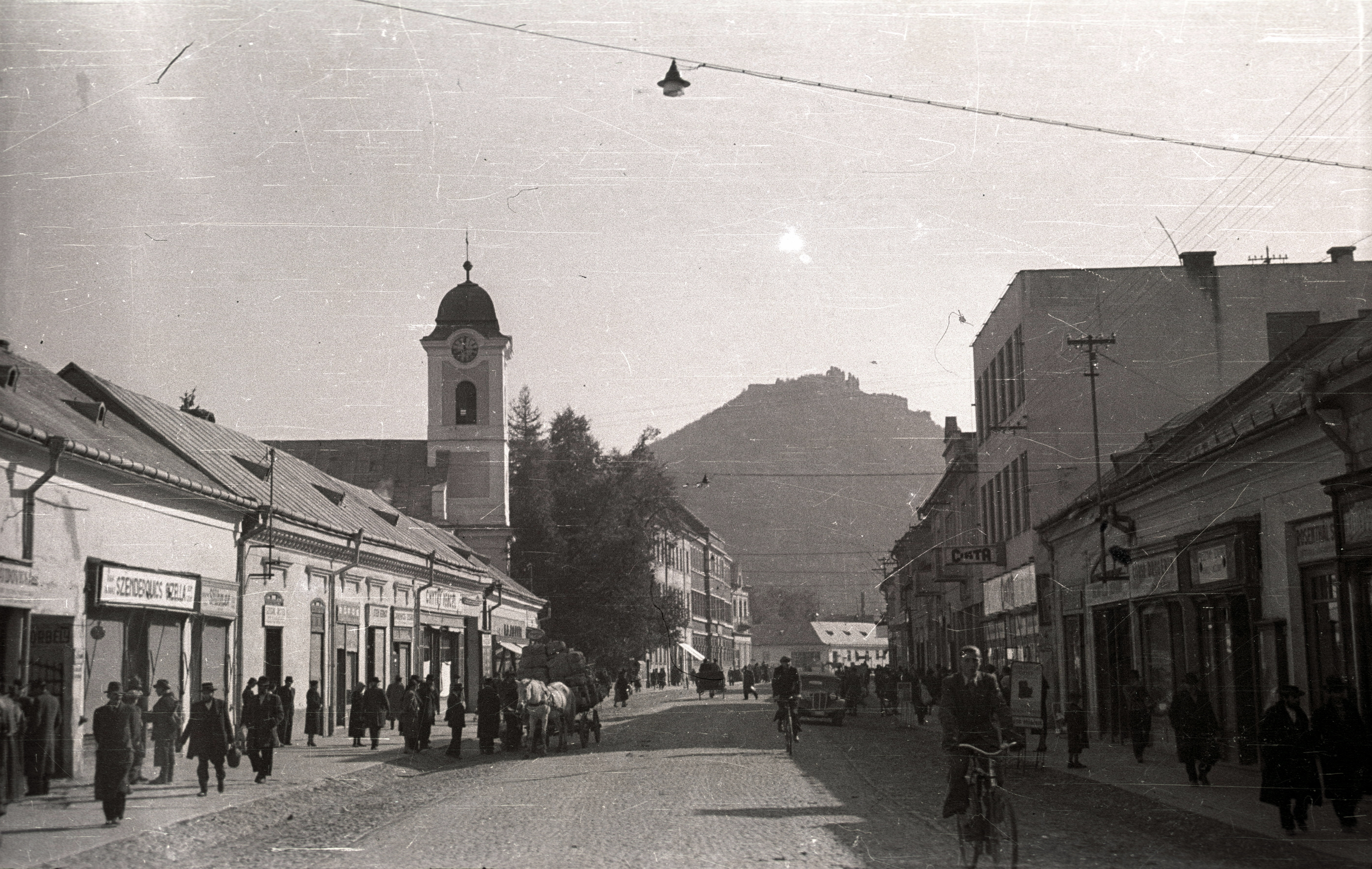 Karpatszkoji Szicsi utca (Rákóczi út) a főtér felől nézve, balra a Szent Anna-templom, háttérben a vár. Location: Ukraine, Khust Tags: bicycle, horse, chariot, cobblestones, church, church clock, Transcarpathia, street view, castle ruins Title: Karpatszkoji Szicsi utca (Rákóczi út) a főtér felől nézve, balra a Szent Anna-templom, háttérben a vár.